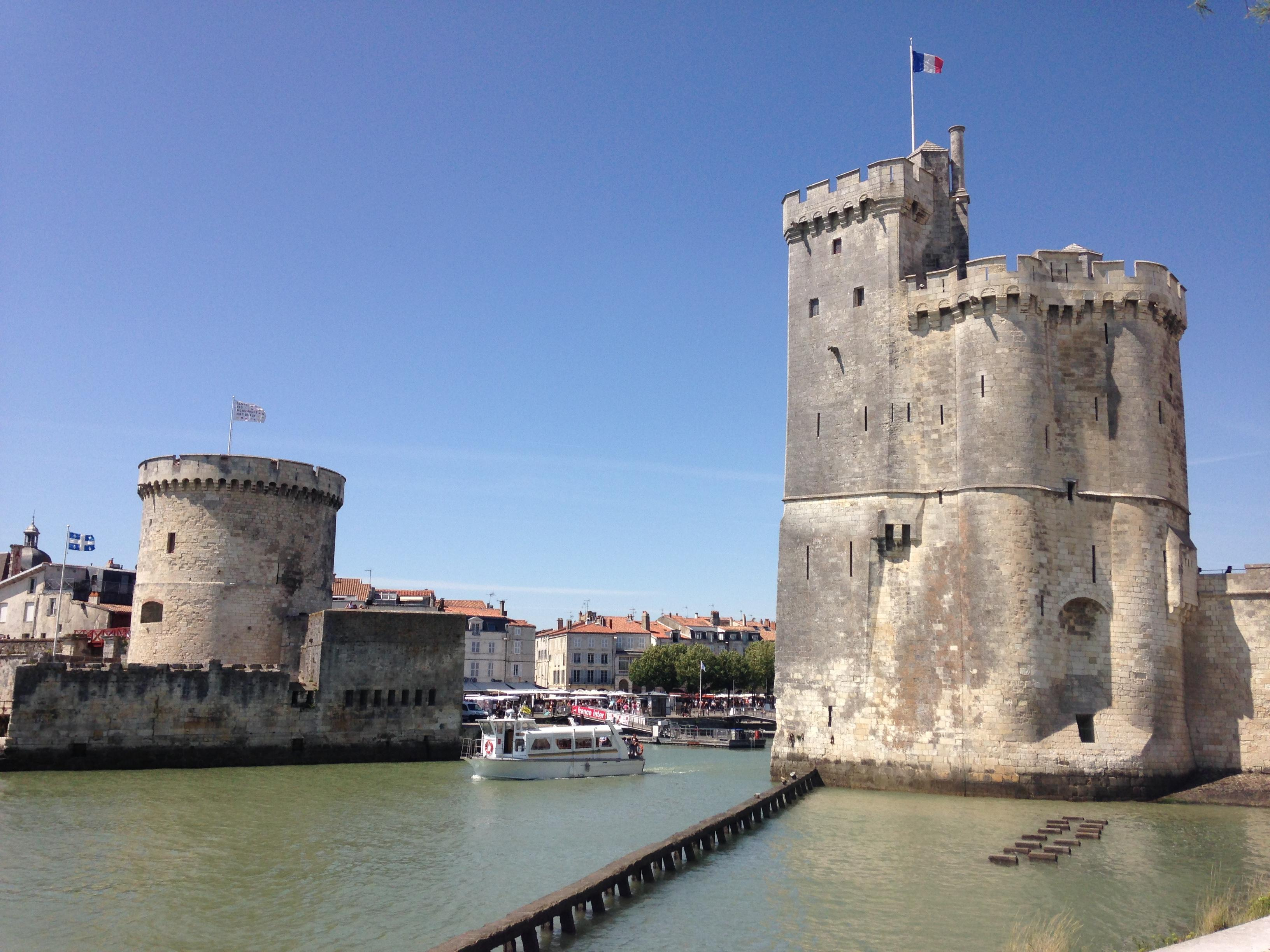 Les tours du vieux port